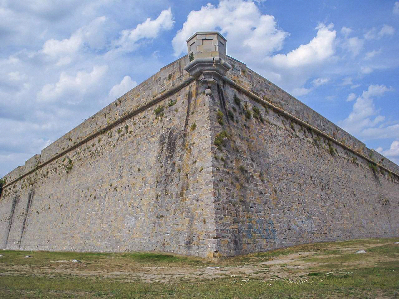 Ciudadela de Pamplona